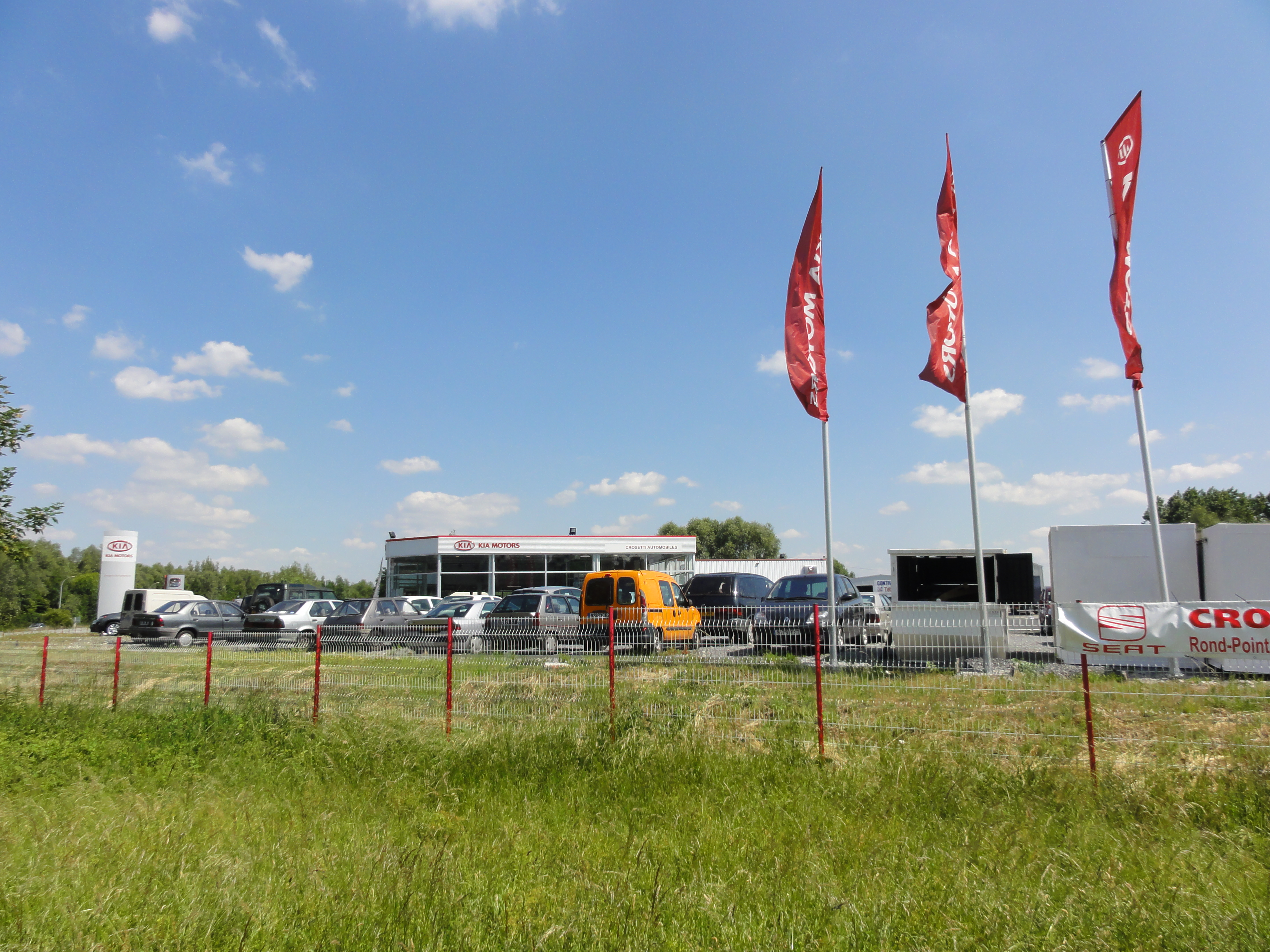 Terril n° 134A dit Camp de la Centrale Ouest, disparu, Centrale de Dechy du Groupe de Douai, Sin-le-Noble, Nord, Nord-Pas-de-Calais, France.